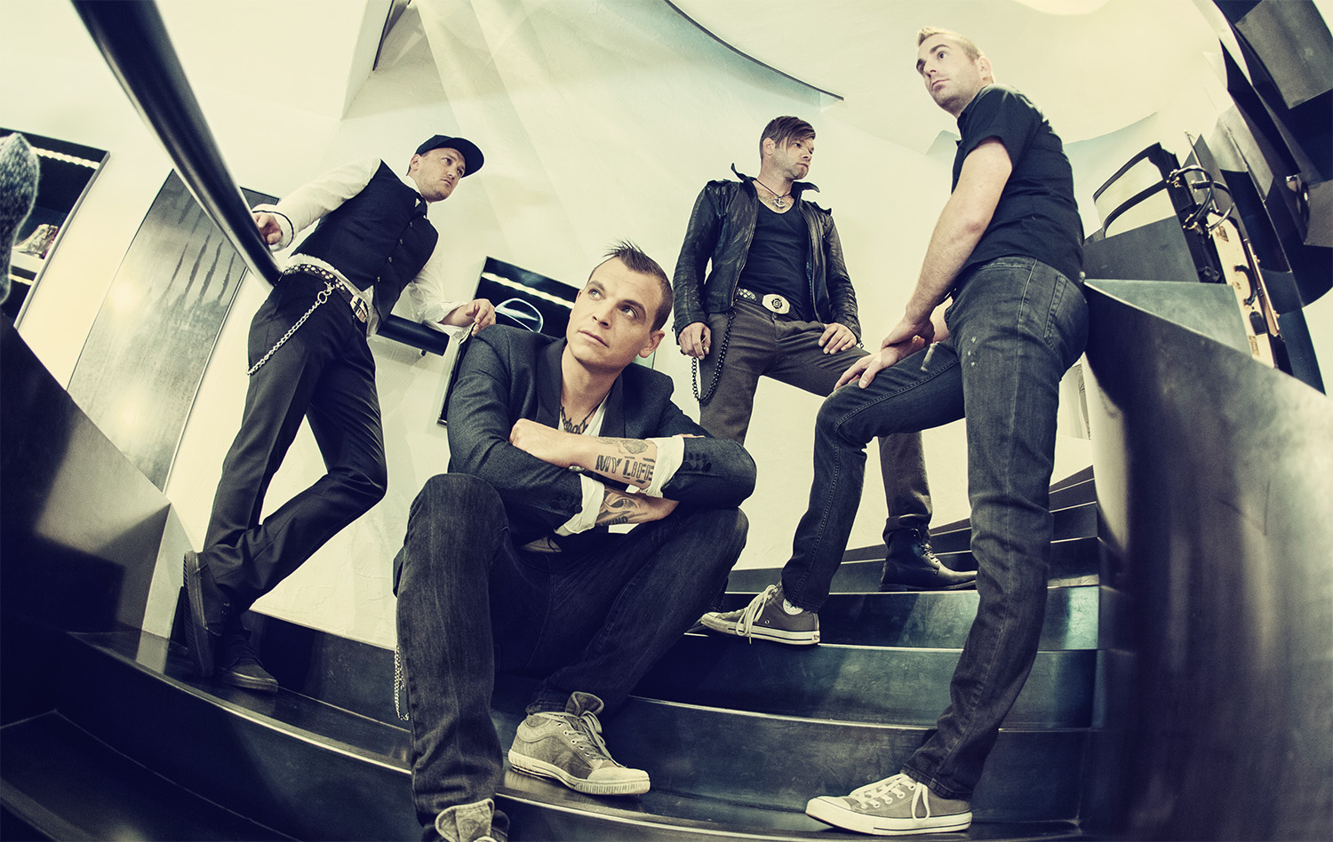 Frei.Wild Bandfoto Still1